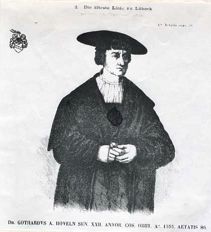 Portrait